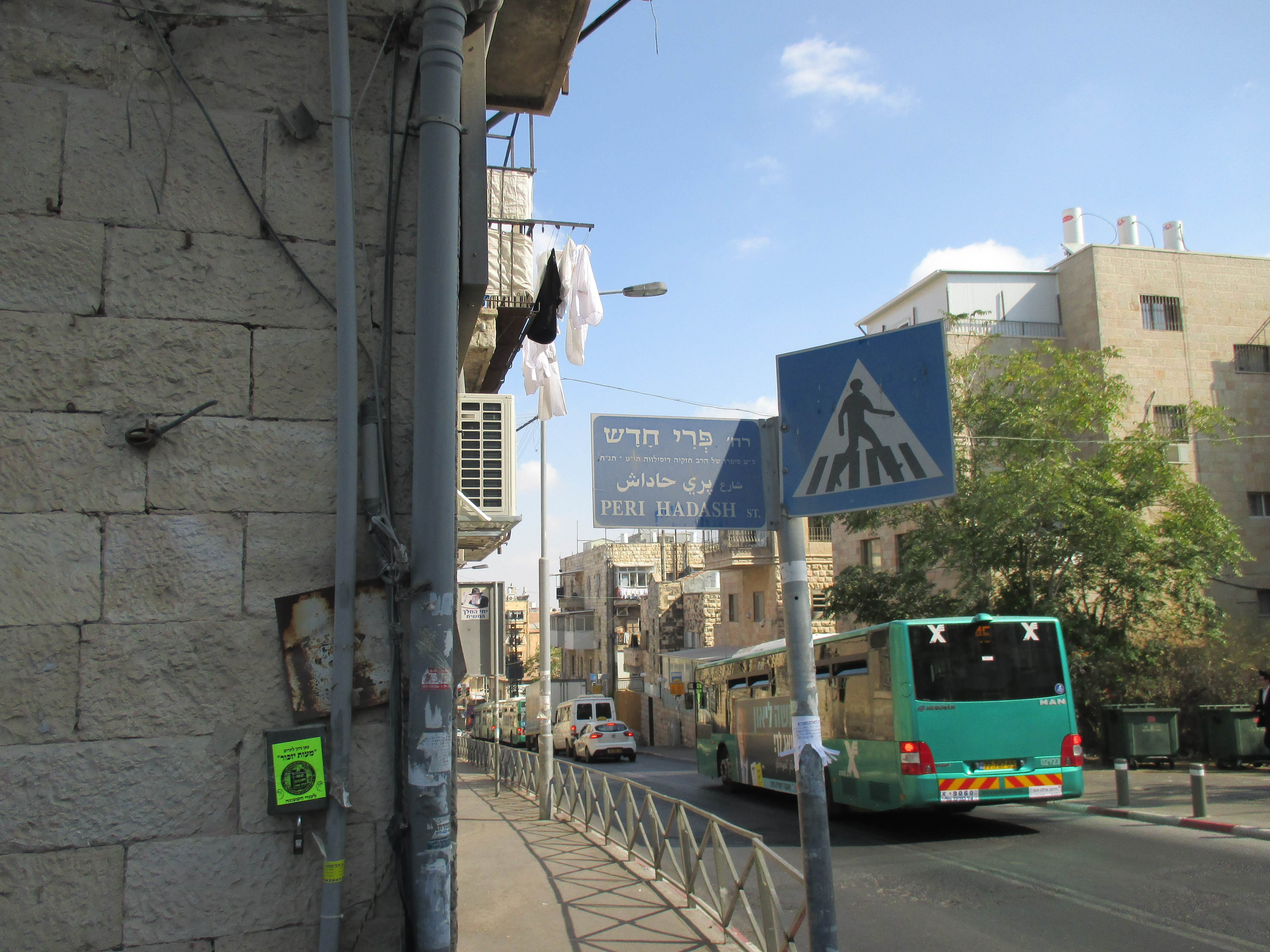 השלט על רחוב פרי חדש בירושלים